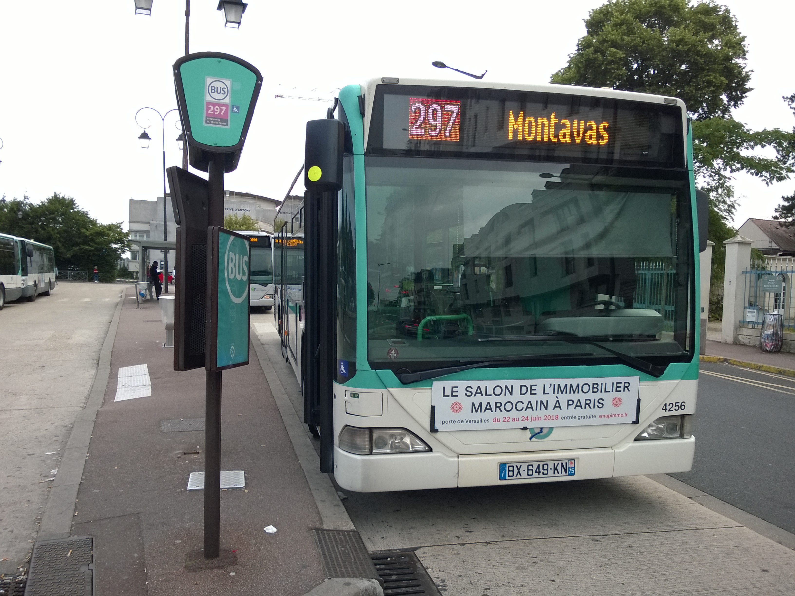 Gare routière de la gare d'Antony, département des Hauts-de-Seine, France.Mercedes-Benz Citaro C1 asurant un service partiel de la ligne 297 pour Montavas.